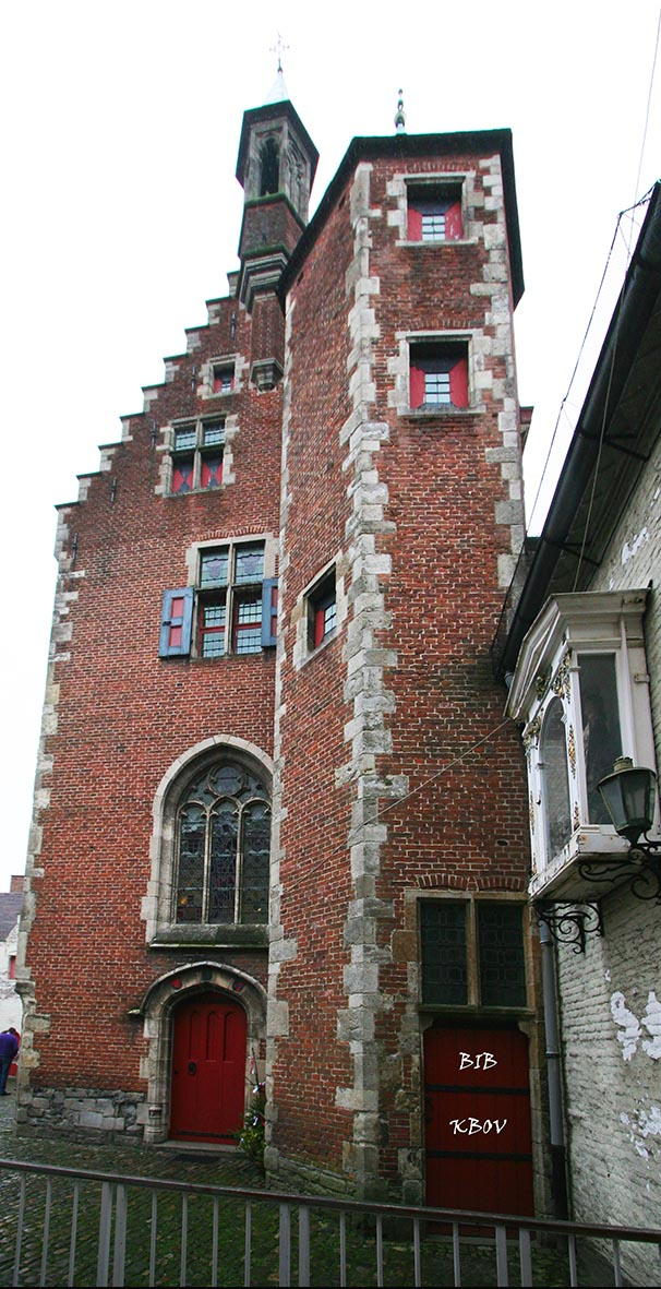 Toegangsdeur tot de KBOV bibliotheek in 2013 op de binnenkoer van het Huis van Alijn, Kraanlei 65, Gent.